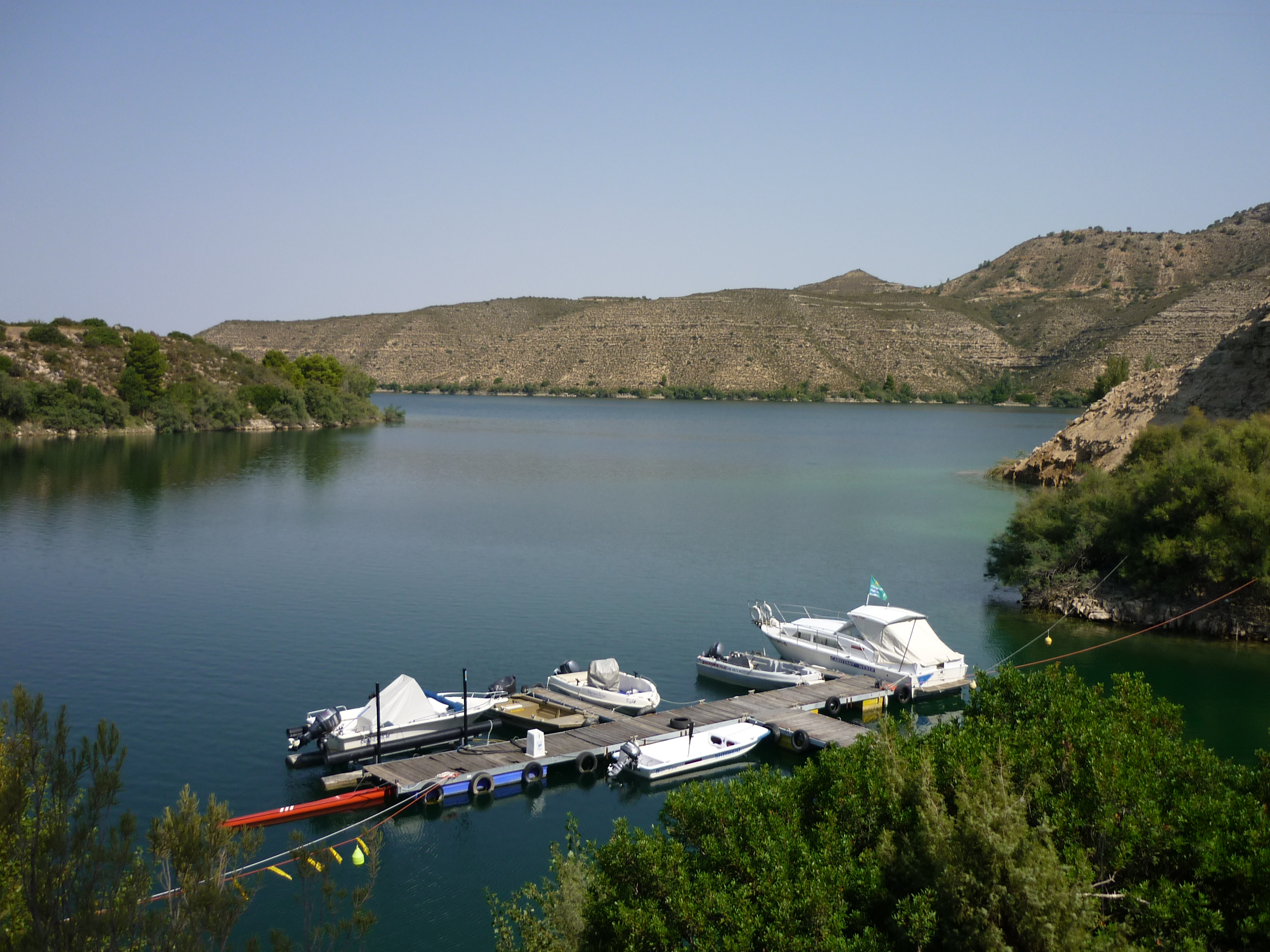 Embalse de Mequinenza